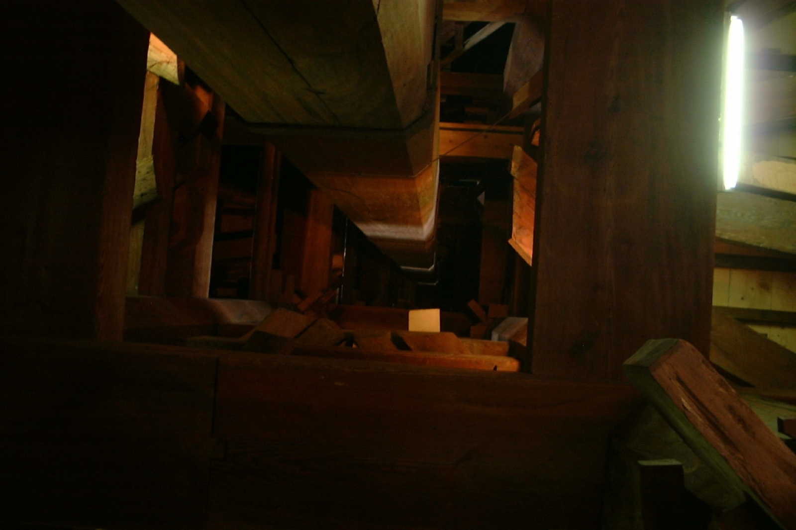 善通寺の五重塔心柱